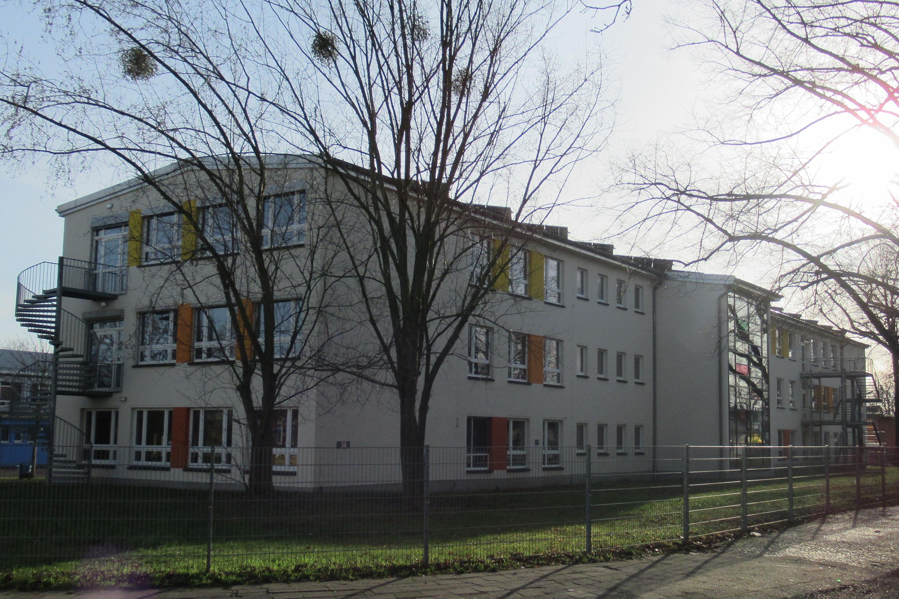 Schule Witzlebenstr. 1, Magdeburg